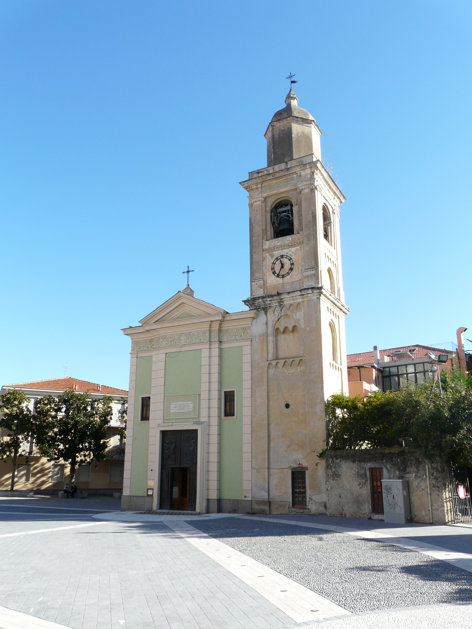 Oratorio di Nostra Signora del Rosario, Confraternita delle Cappe Turchine, Loano, Liguria, Italia